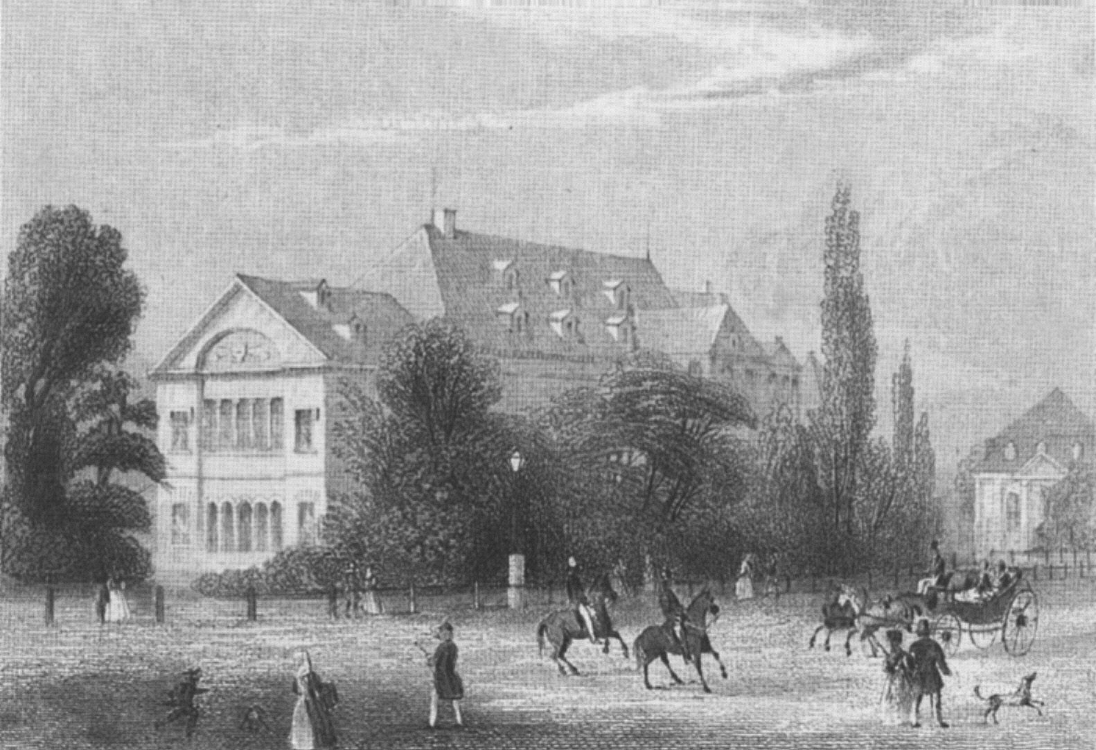 Stich von Albert Henry Payne aus "Leipzig um 1860" (mit 1850 herausgegebenen Stahlstichen): Das Theater (Altes Theater)